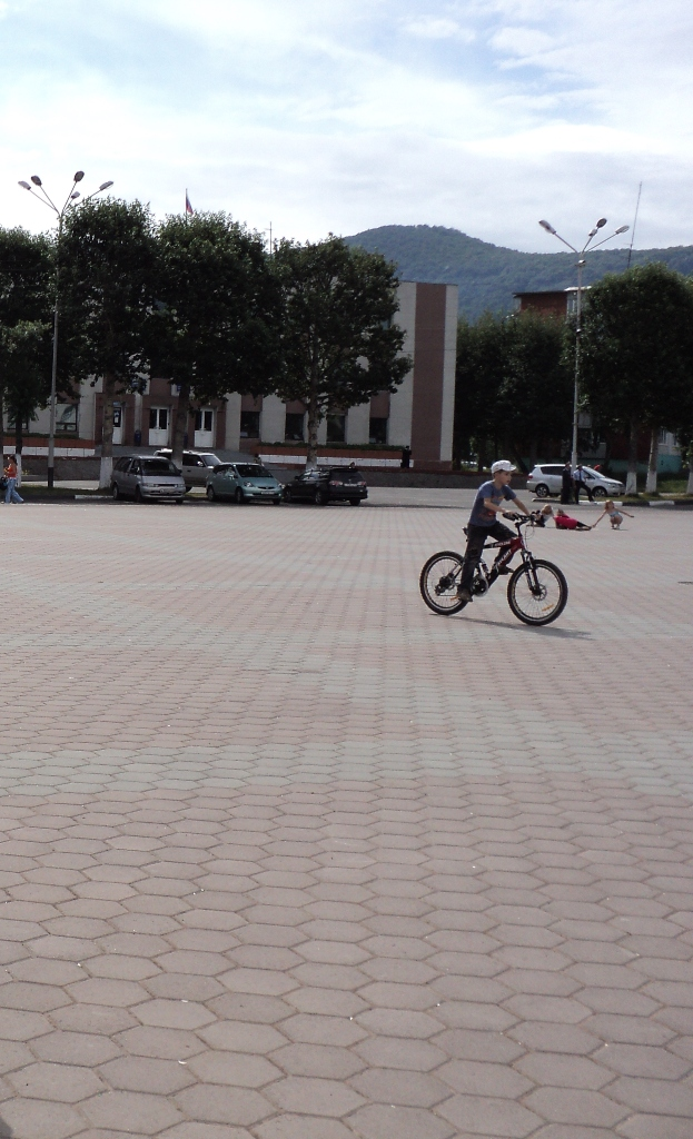 город Вилючинск Камчатский край центральная площадь